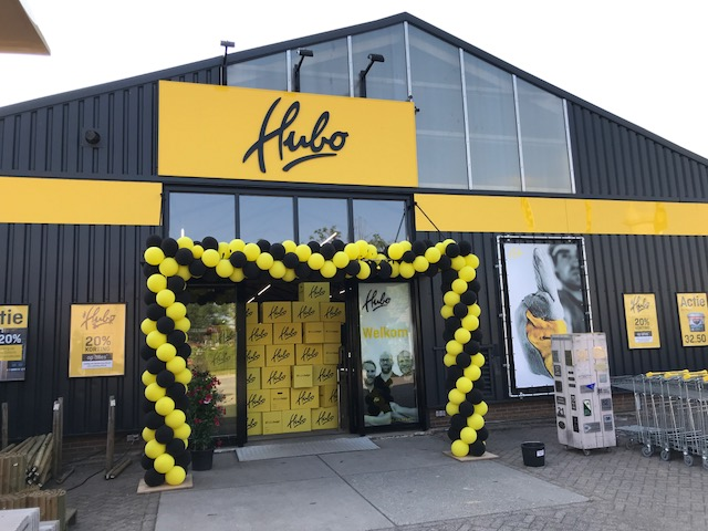 Opening vernieuwde Hubo Meerkerk.